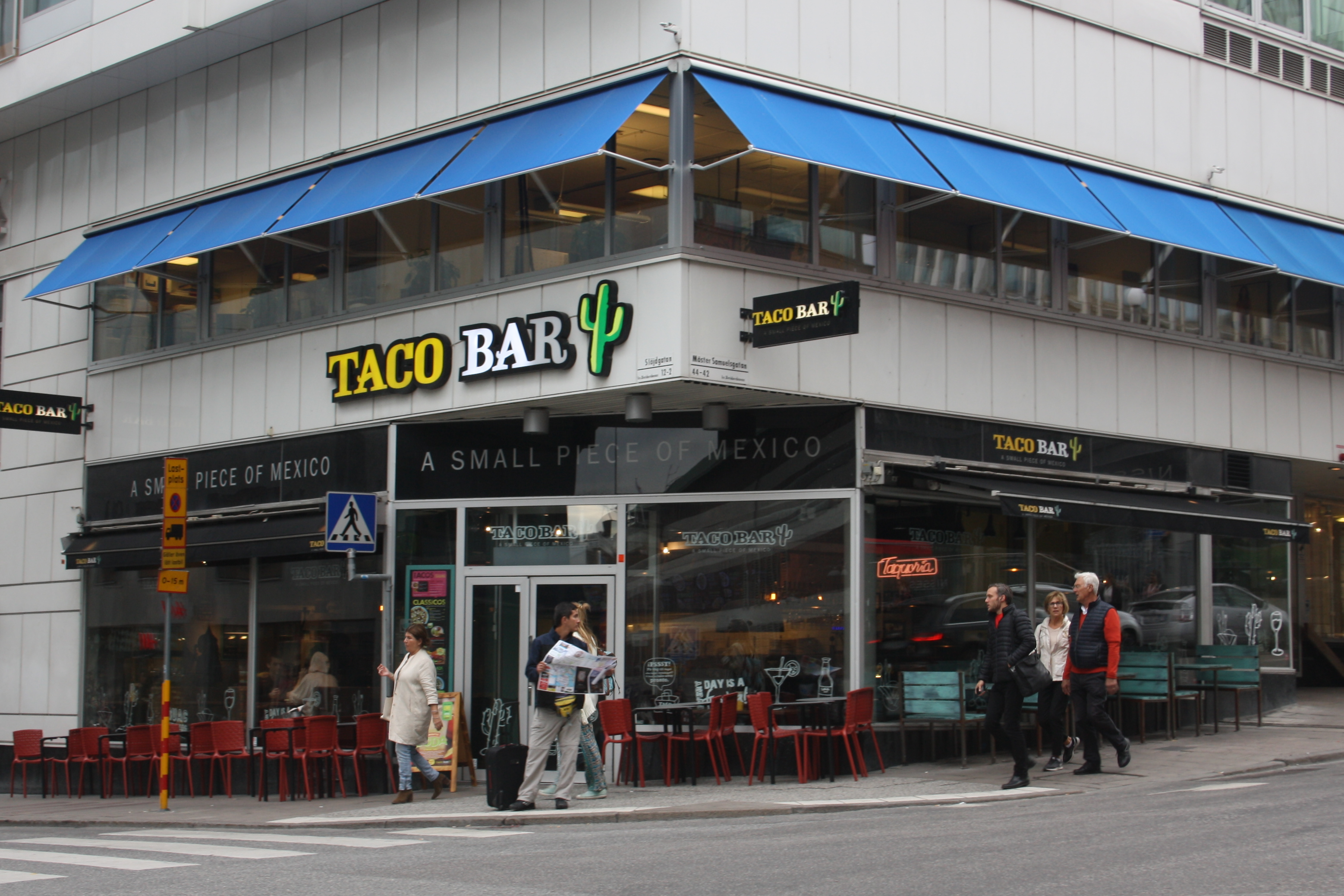 Tacobar i Stockholm